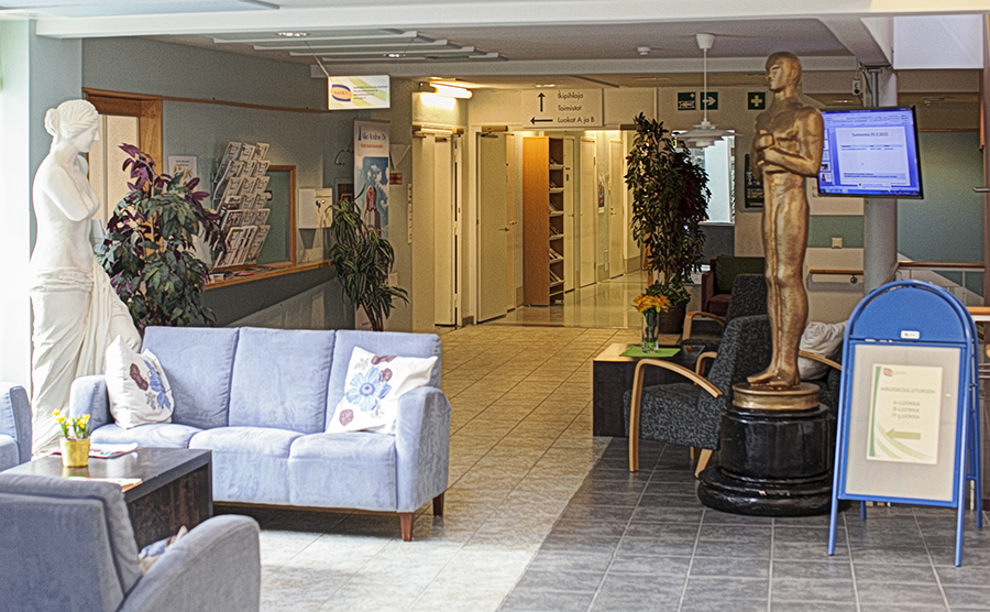 Sastamalan koulutuskuntayhtymän aikuiskoulutusosasto ja oppisopimustoimiston Voimarinteen toimipisteen aula.